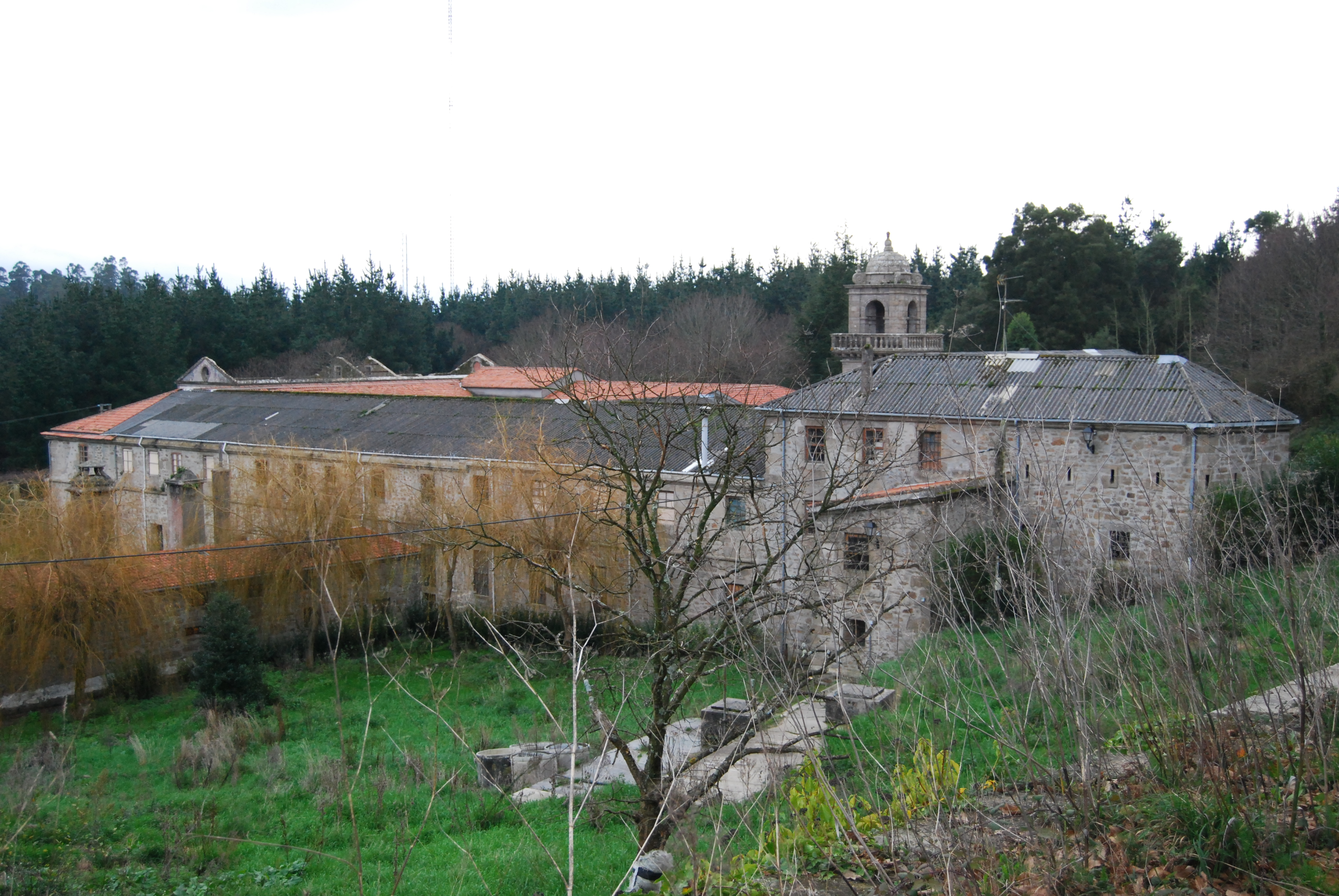 Mosteiro de Santa Catalina